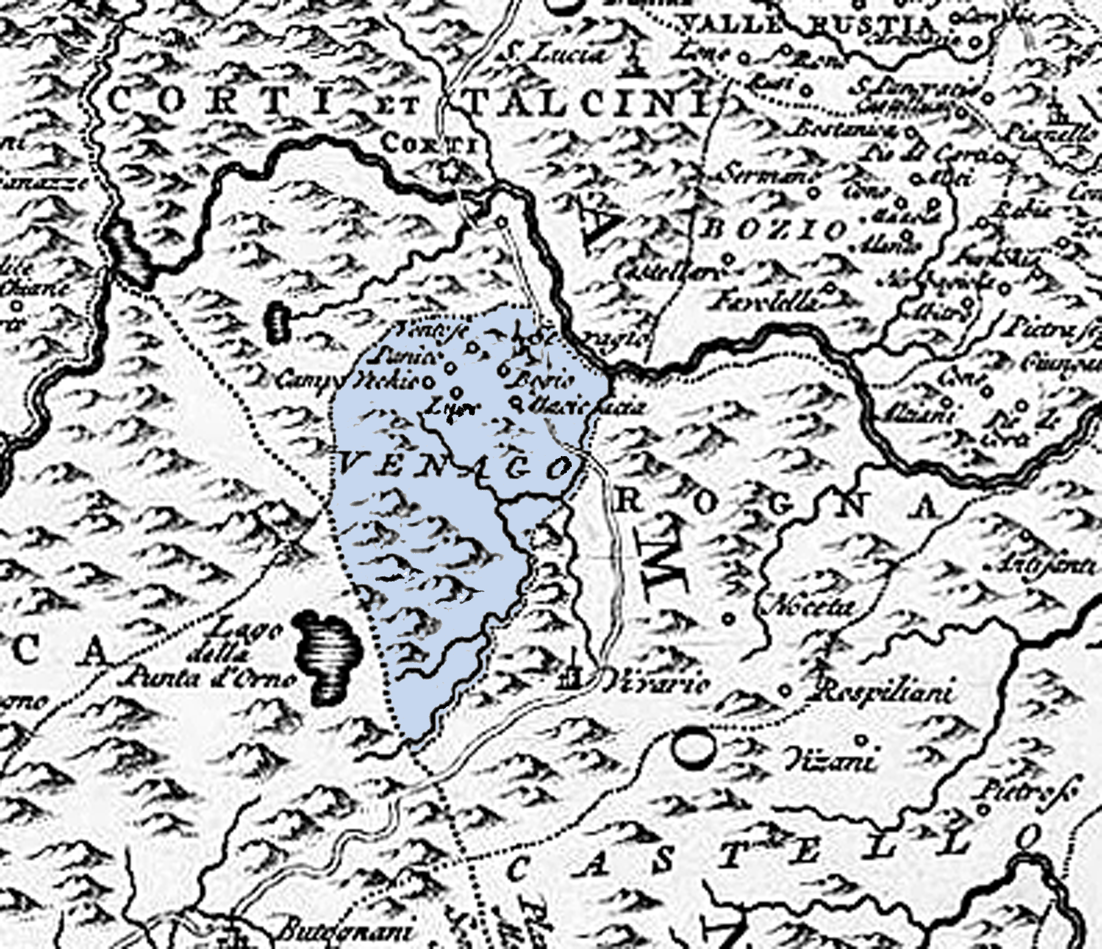 Extrait de la carte du capitaine Vogt (1737) concernant la pieve de Venaco et ses voisines